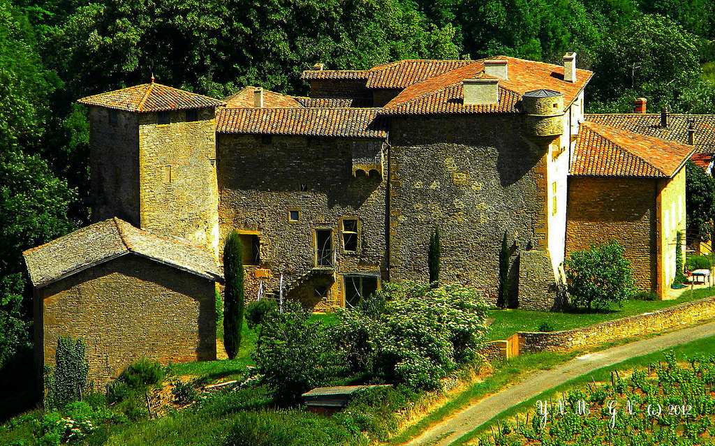 etat du jardin en 2008